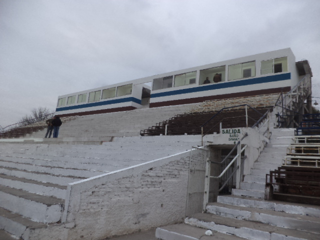 Nuevas cabinas del Estadio Fray Honorato Pistoia.